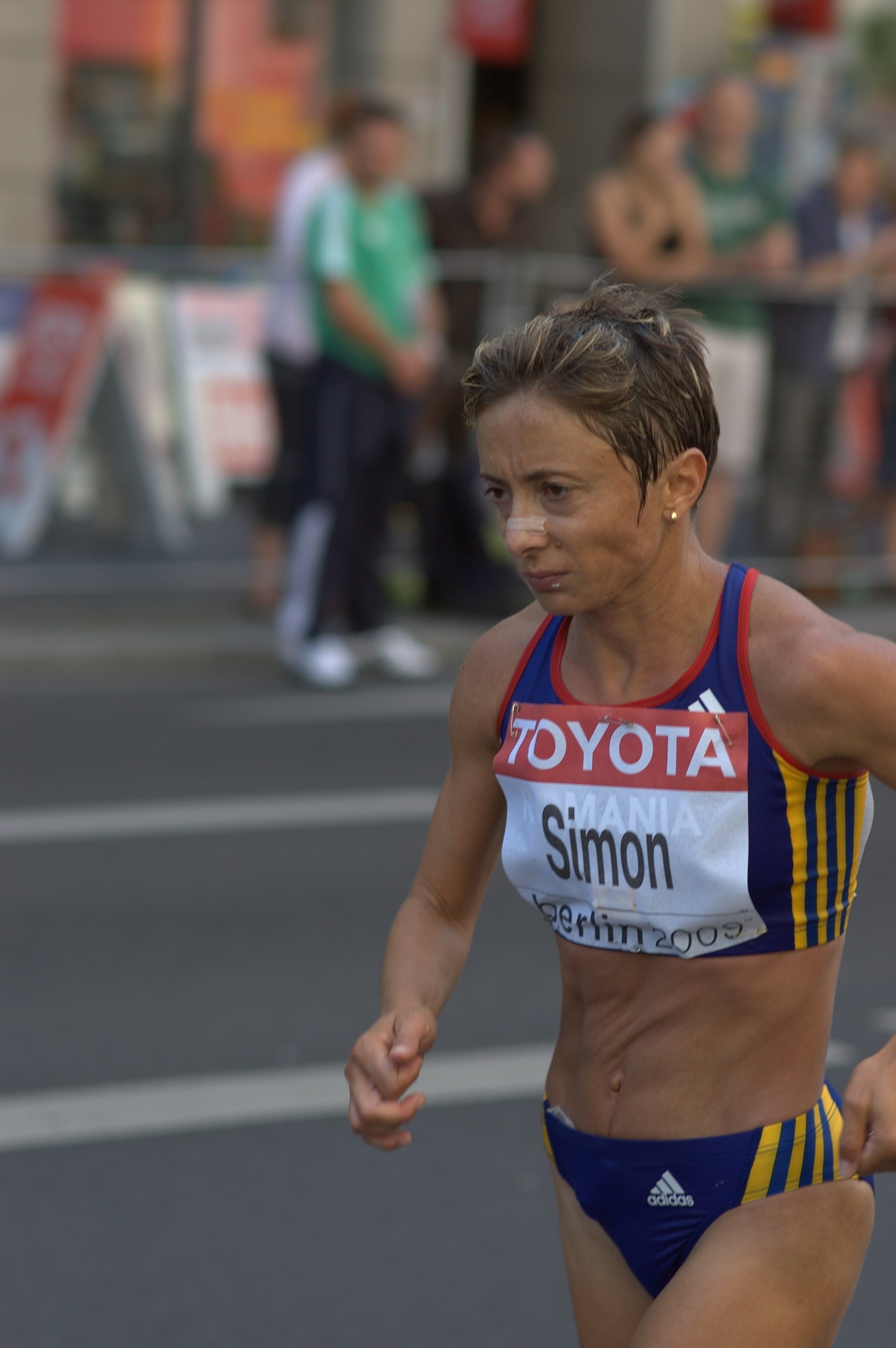 Leichtathletik Weltmeisterschaft Berlin 2009, Frauen-Marathon. Lidia Simon.